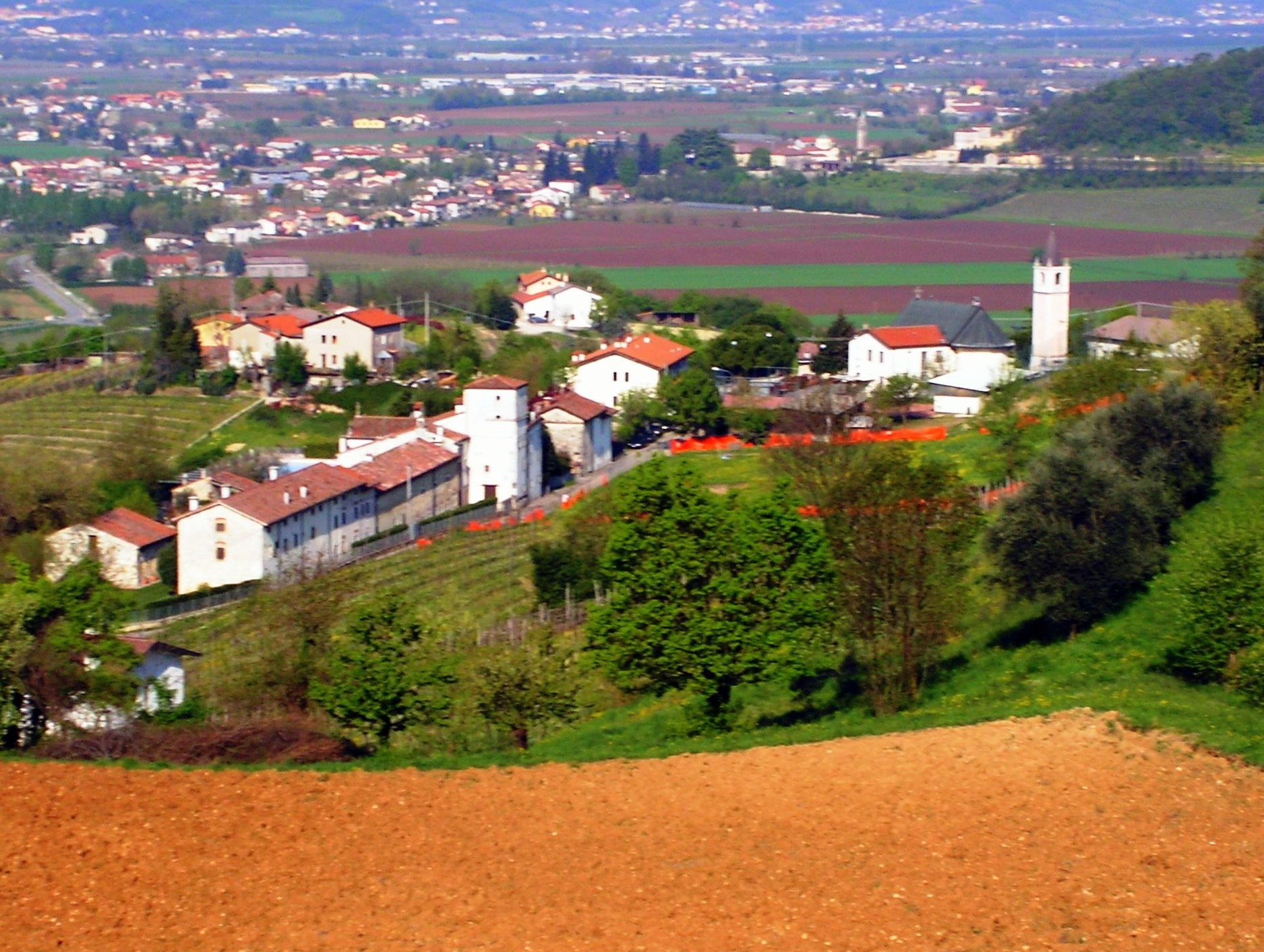 Nicky 94; Visuale della frazione di San Vito, comune di Brendola (VI), dalla contrada Ca'Vecchie.